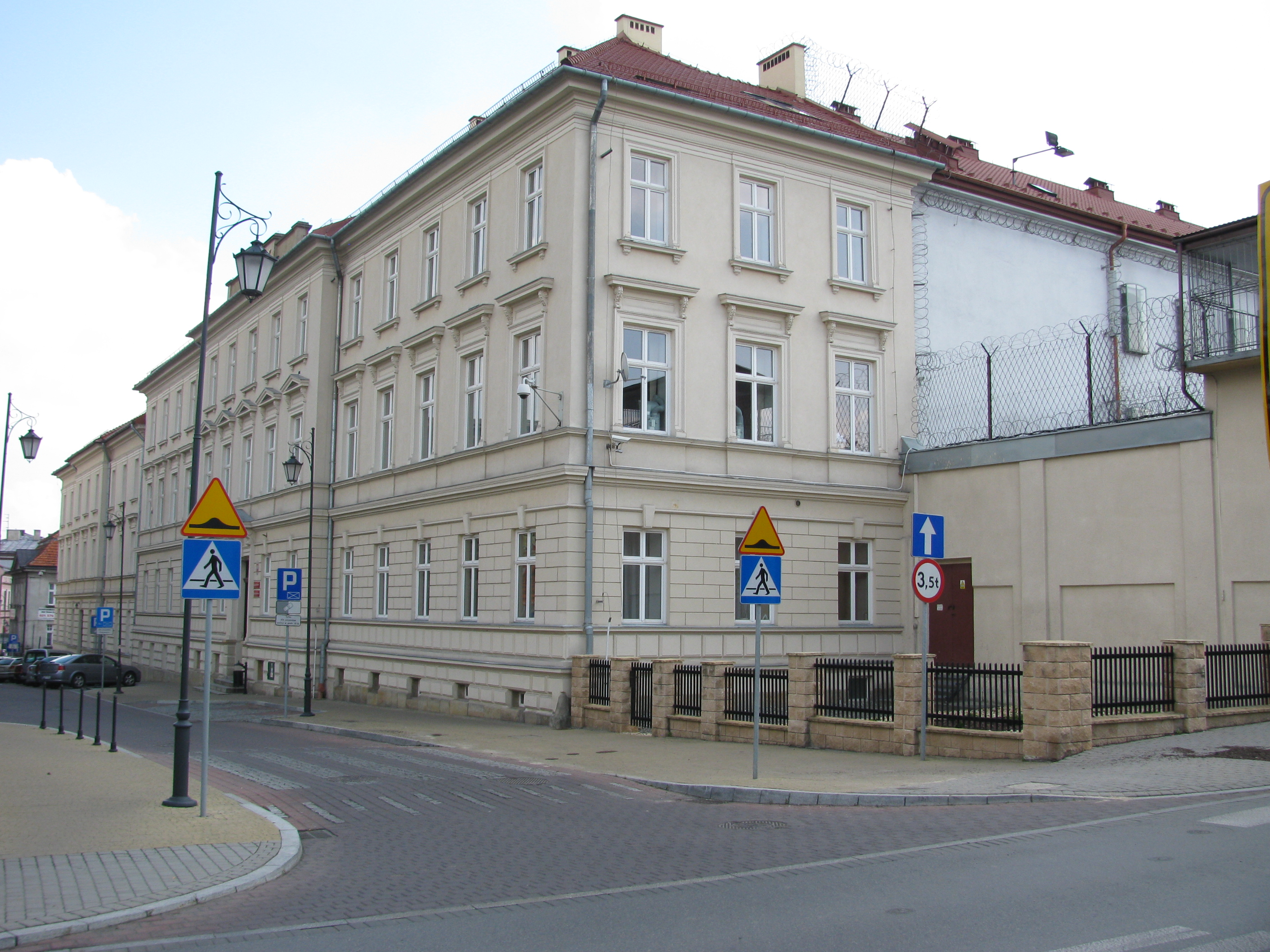 zespół budynków Sądu Rejonowego, Wadowice, ul. Żwirki i Wigury 7-9